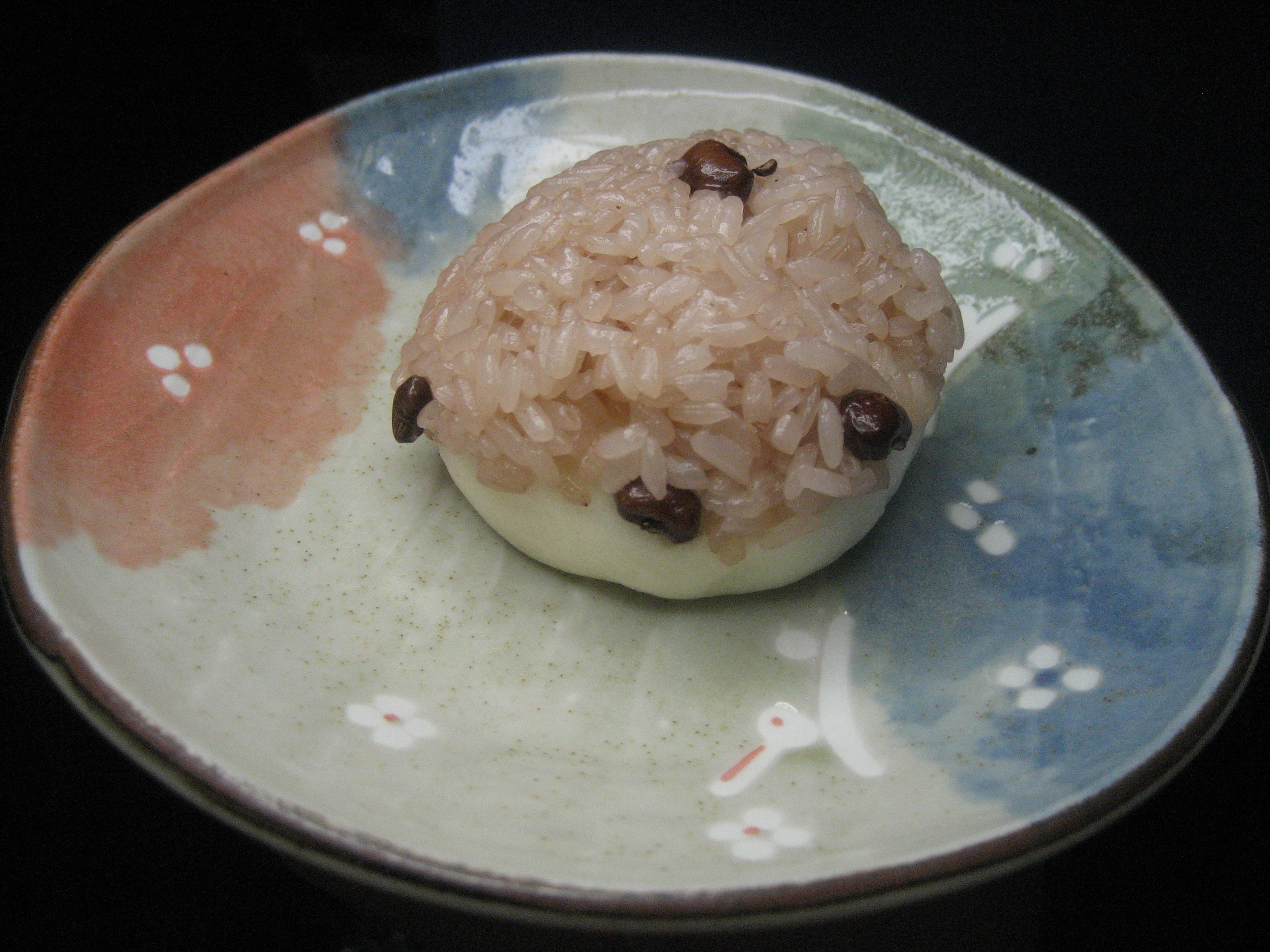 埼玉県加須市で購入した いが饅頭